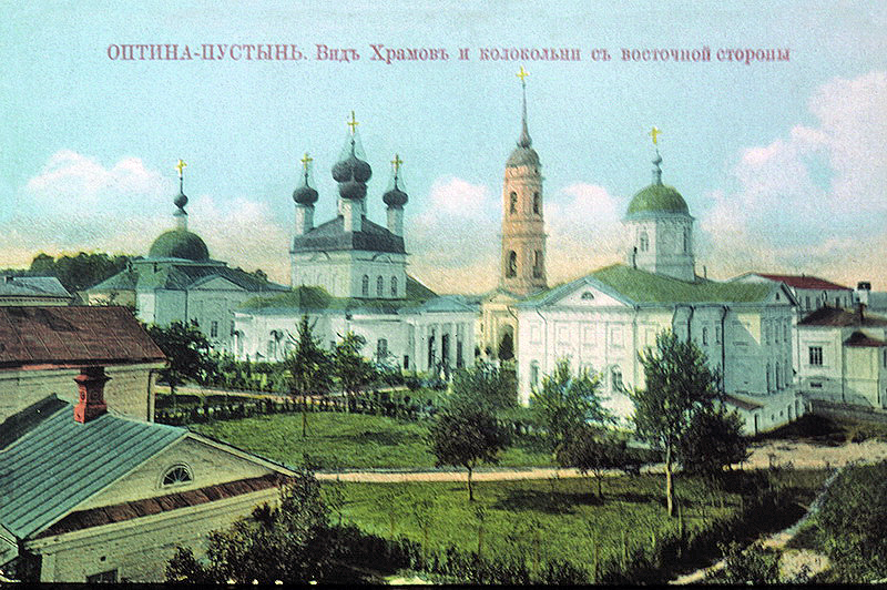 в Оптиной Пустыни. Дореволюционное фото